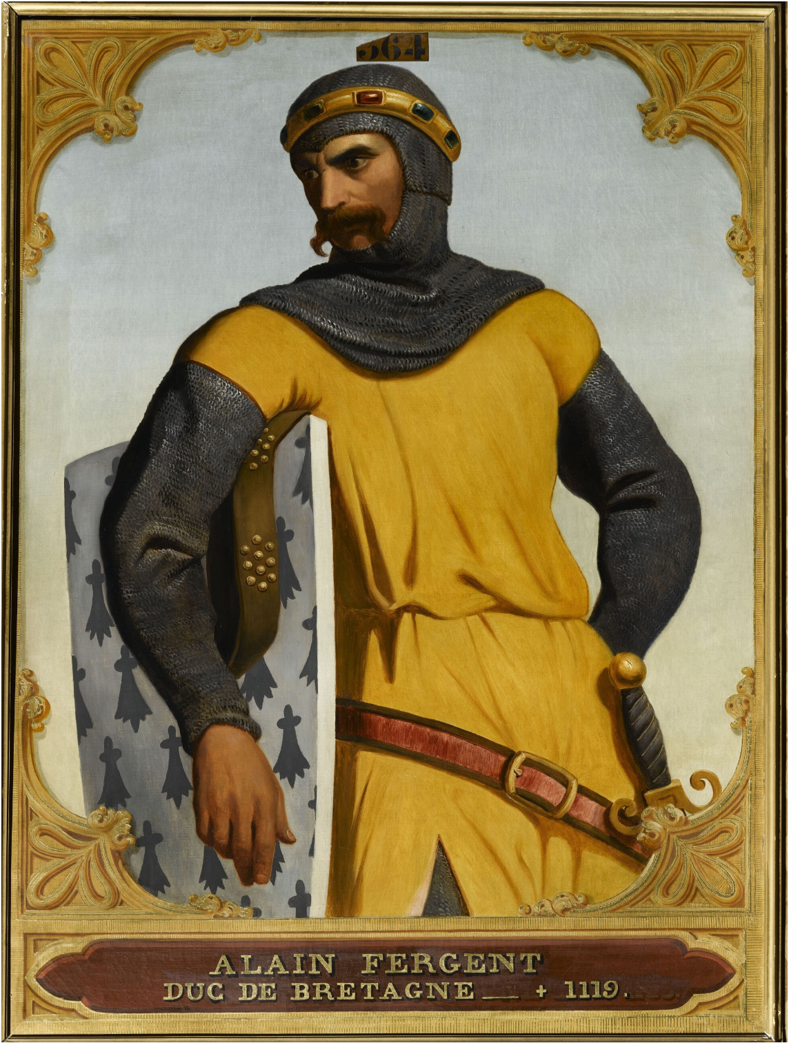 Alain IV de Bretagne, dit Fergent, duc de Bretagne